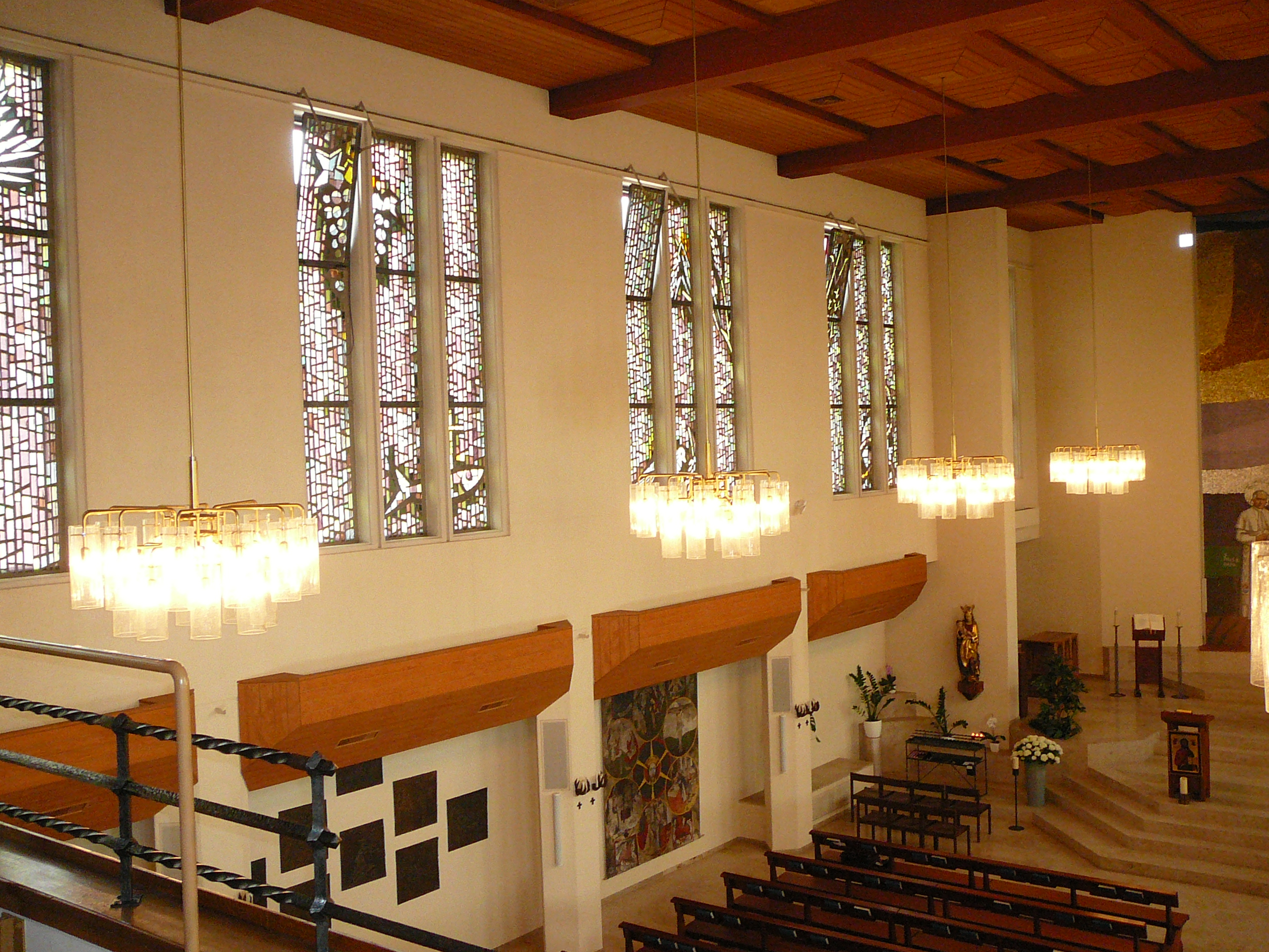 Römisch-katholische Kirche Erlöser Zürich-Riesbach, Innenraum